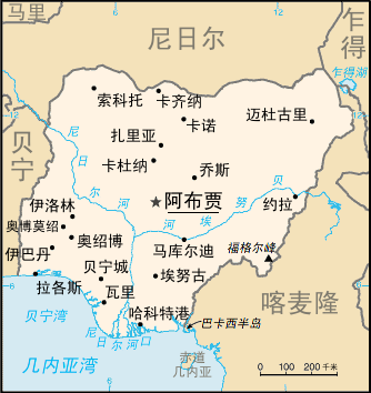 尼日利亚地图。